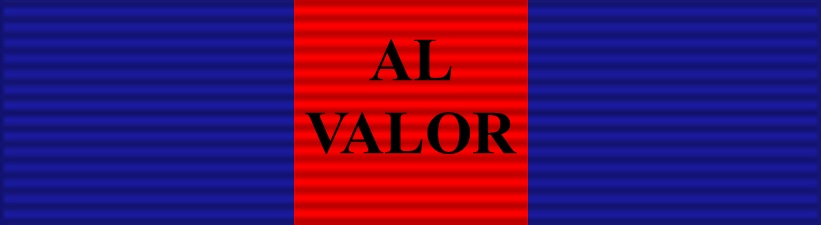 Cinta de la Medalla Al valor (Chile) según descripción oficial [1]